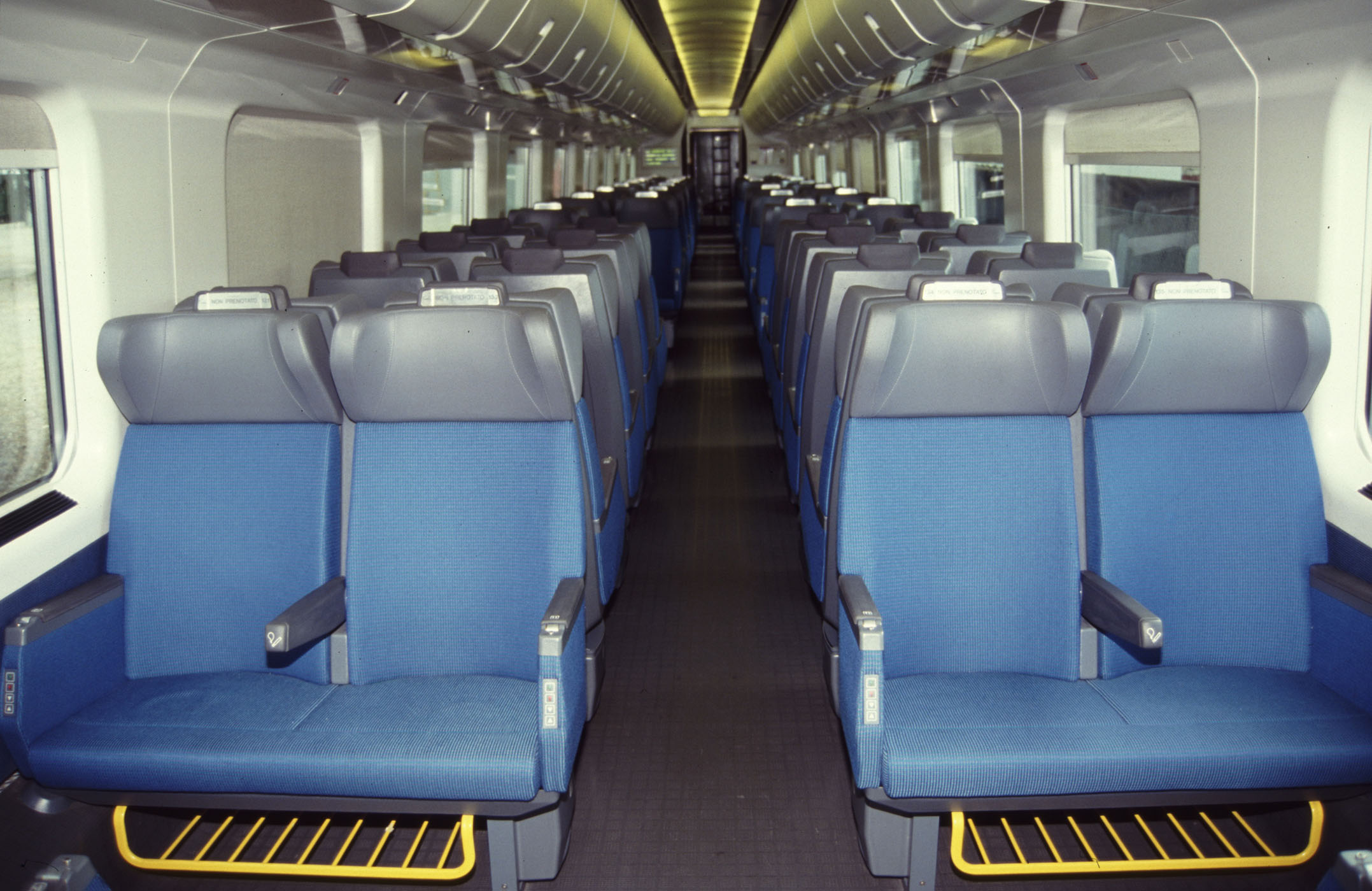 Interno di carrozza dell'ETR 500 X prototipo in mostra a Bologna nel 1994, autore Sandro Baldi, Bologna, Italia